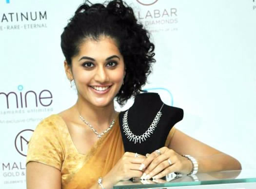 Taapsee Pannu unveils Malabar's new jewellery range